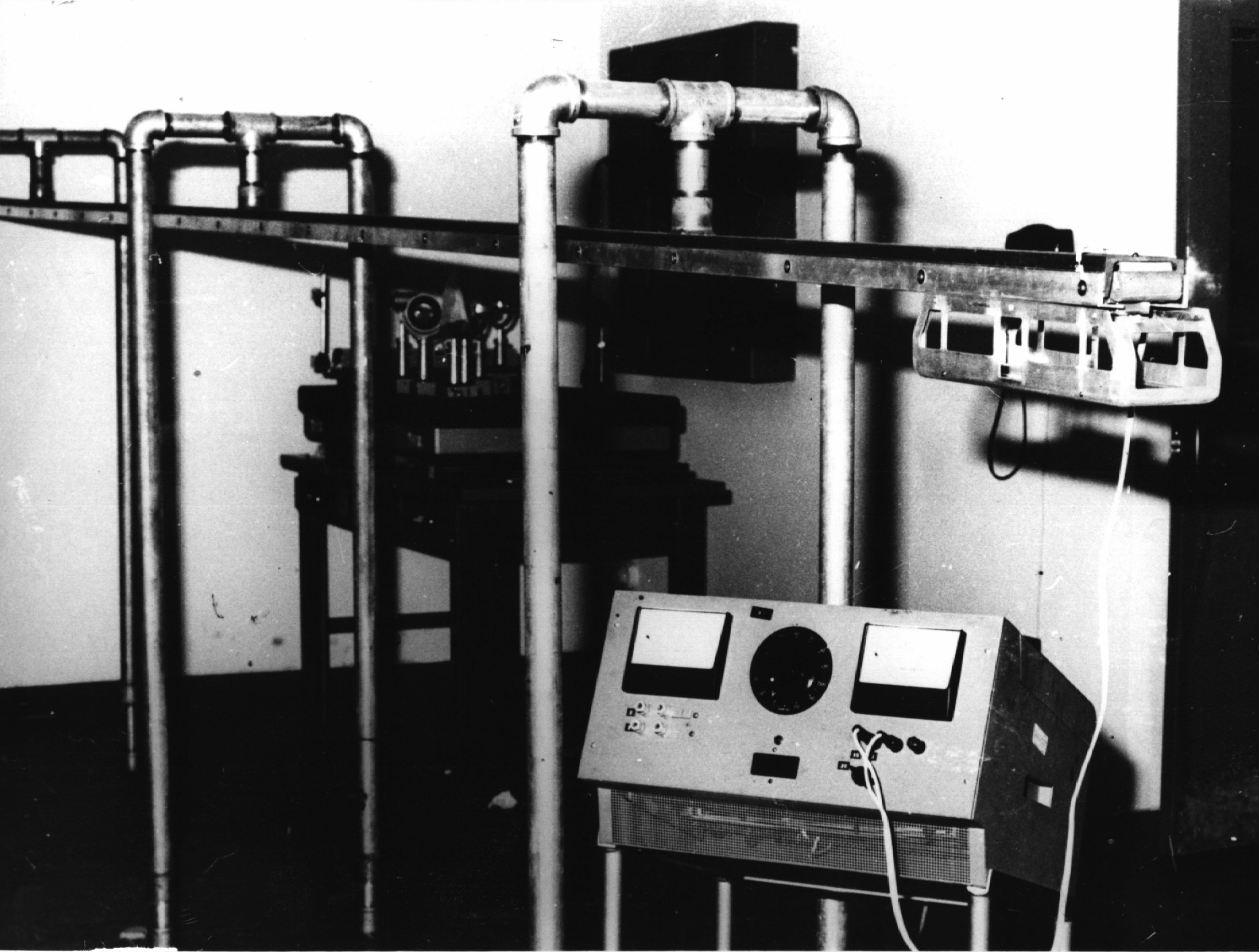 Prototipo 1 del TELMAG